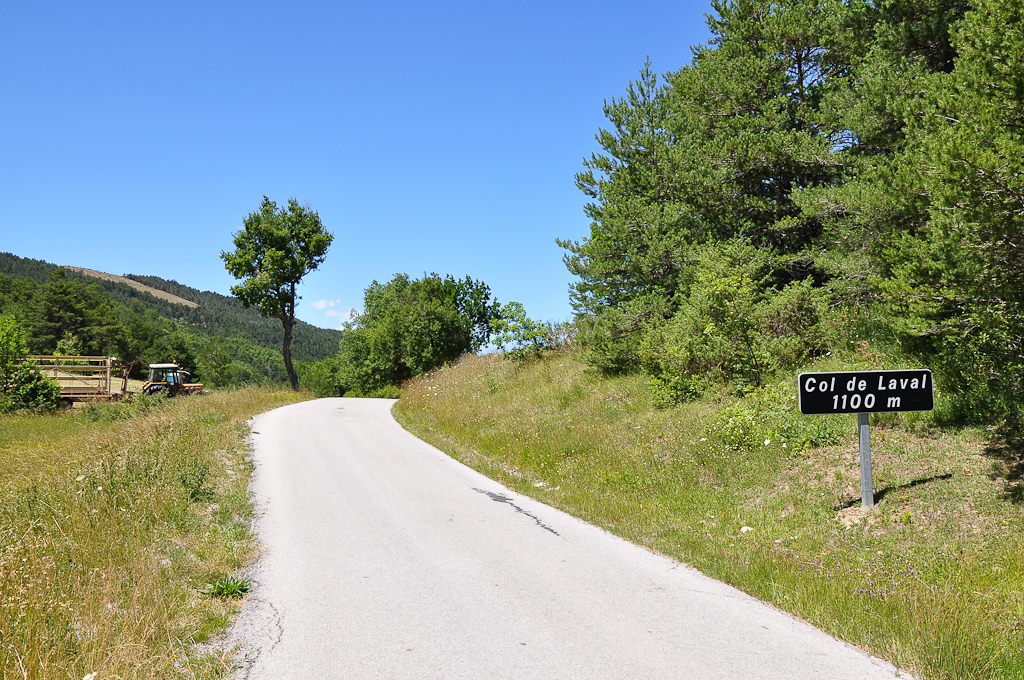 Col de Laval à Montblanc